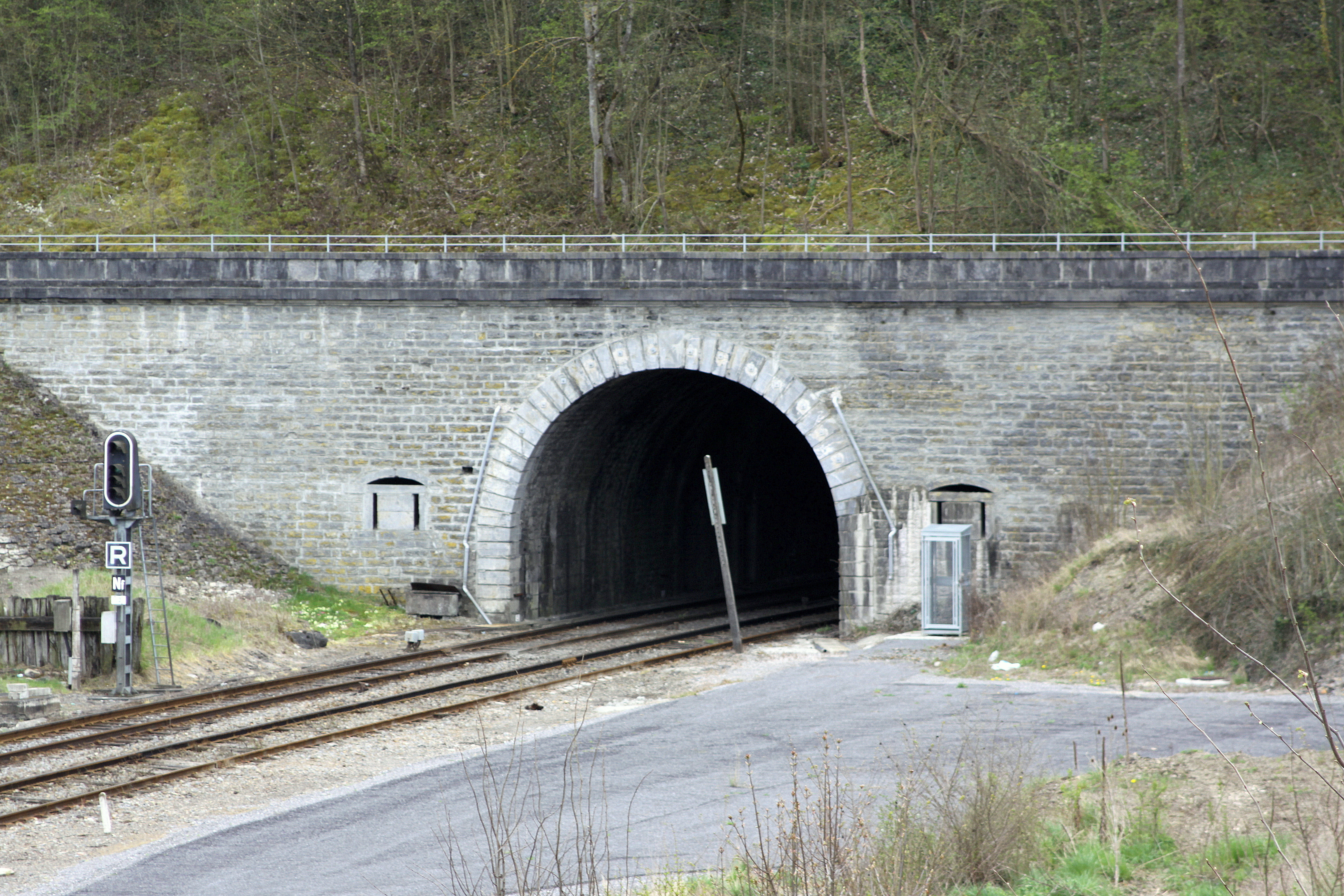 Den Tunnel Charlemont zu Givet